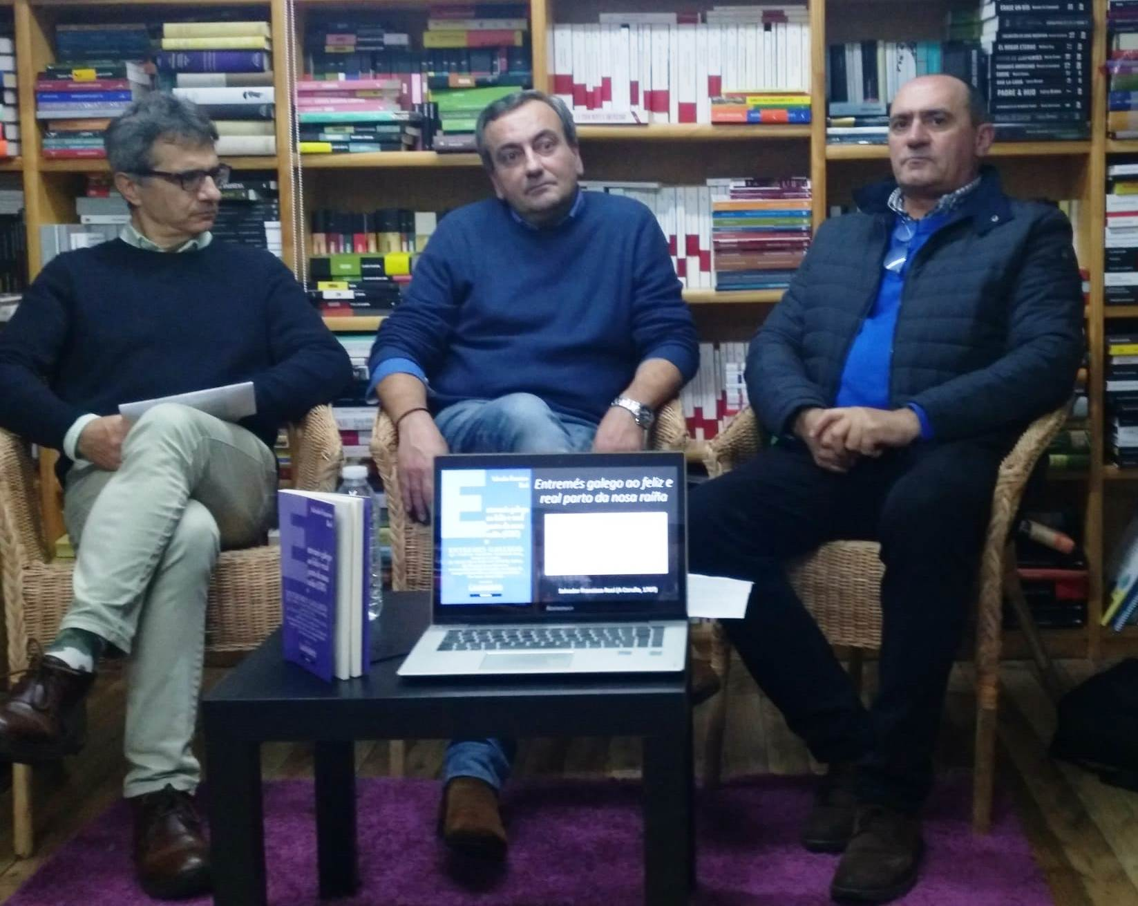 Ramón Mariño Paz Julio González Montañés Anxo Angueira na Libraría Paz de Pontevedra presentando "Entremés galego ao feliz e real parto da nosa raíña" de Salvador Francisco Roel